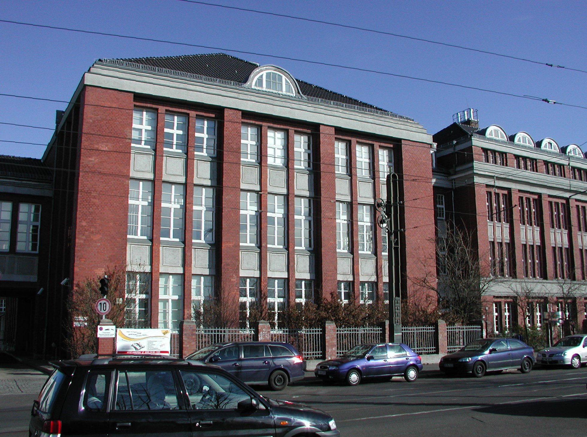 Corvushaus (3)